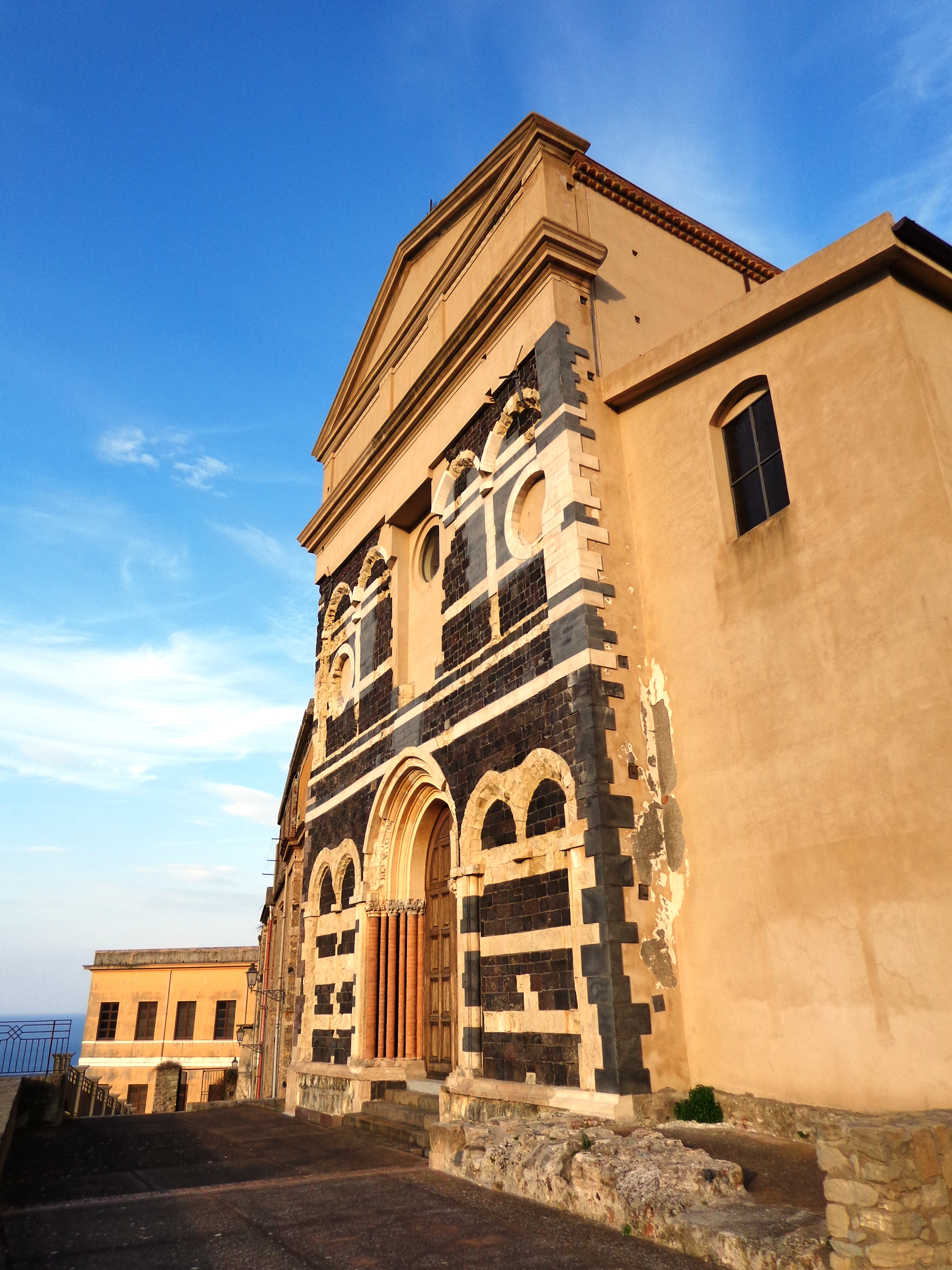 Cattedrale Patti 03